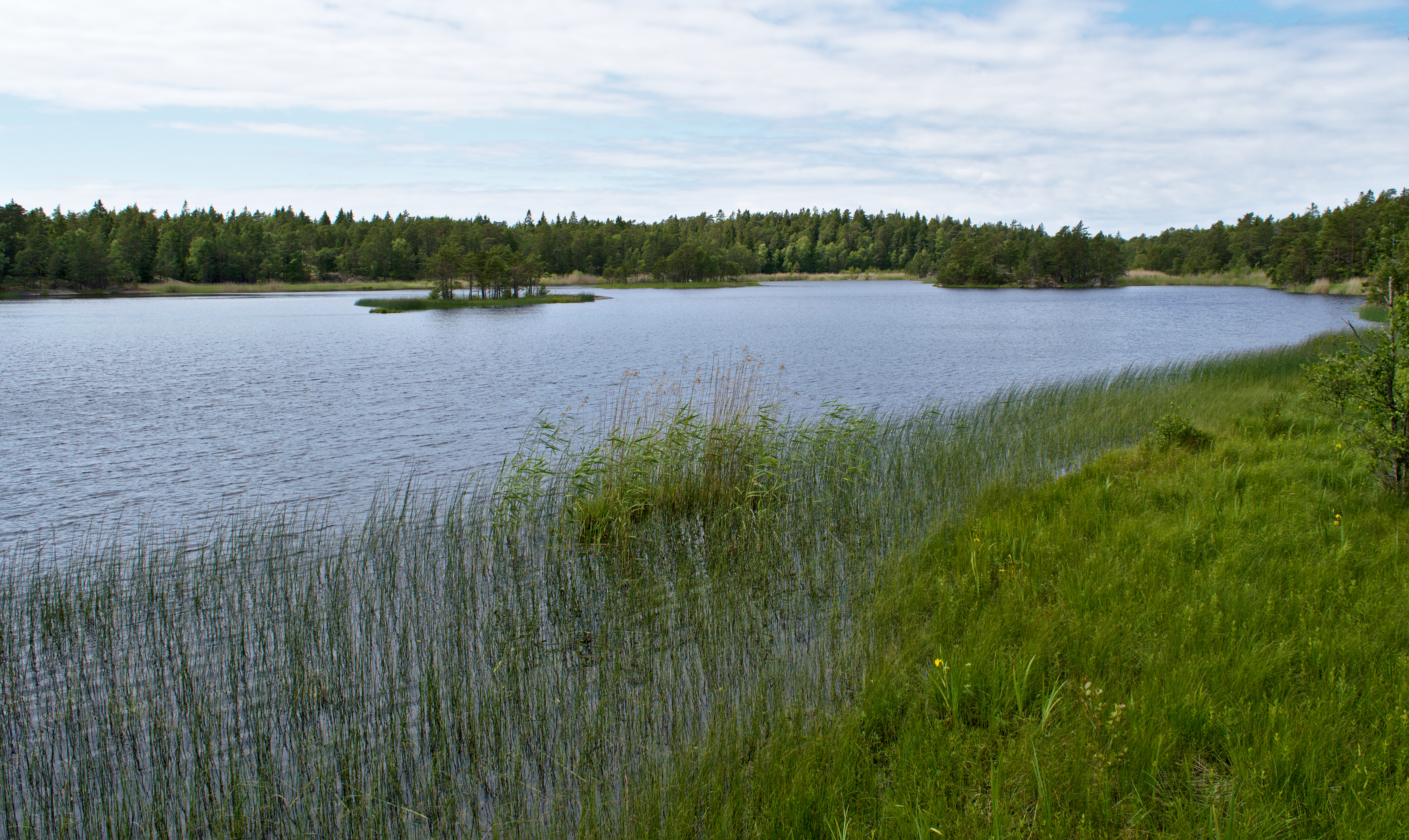 Sjön Hålsjön på Ornö i Stockholms skärgård. Sett österifrån.